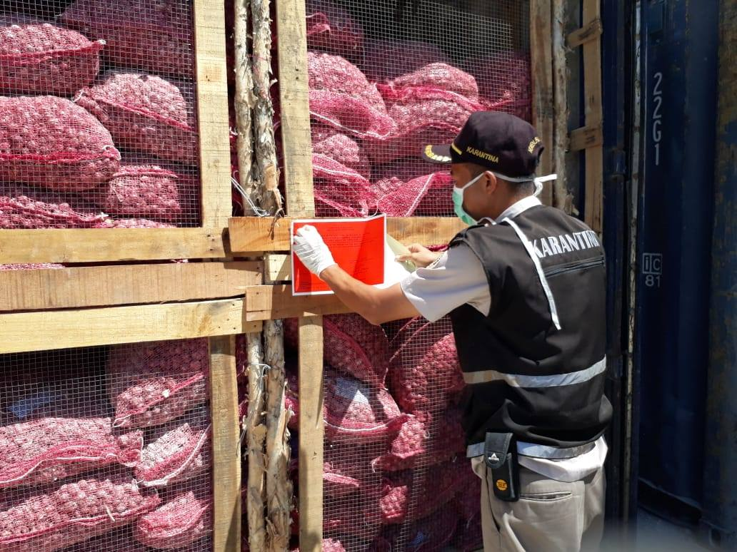 Pejabat karantina tumbuhan yang bertugas di Badan Karantina Pertanian sedang menahan masuknya kontainer bawang merah tanpa dokumen karantina.